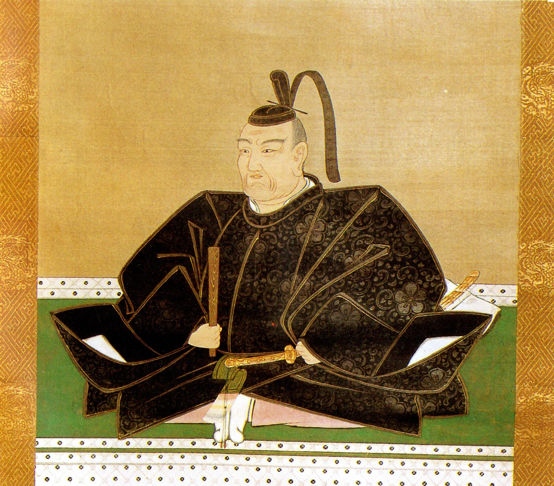 土岐頼稔の肖像。